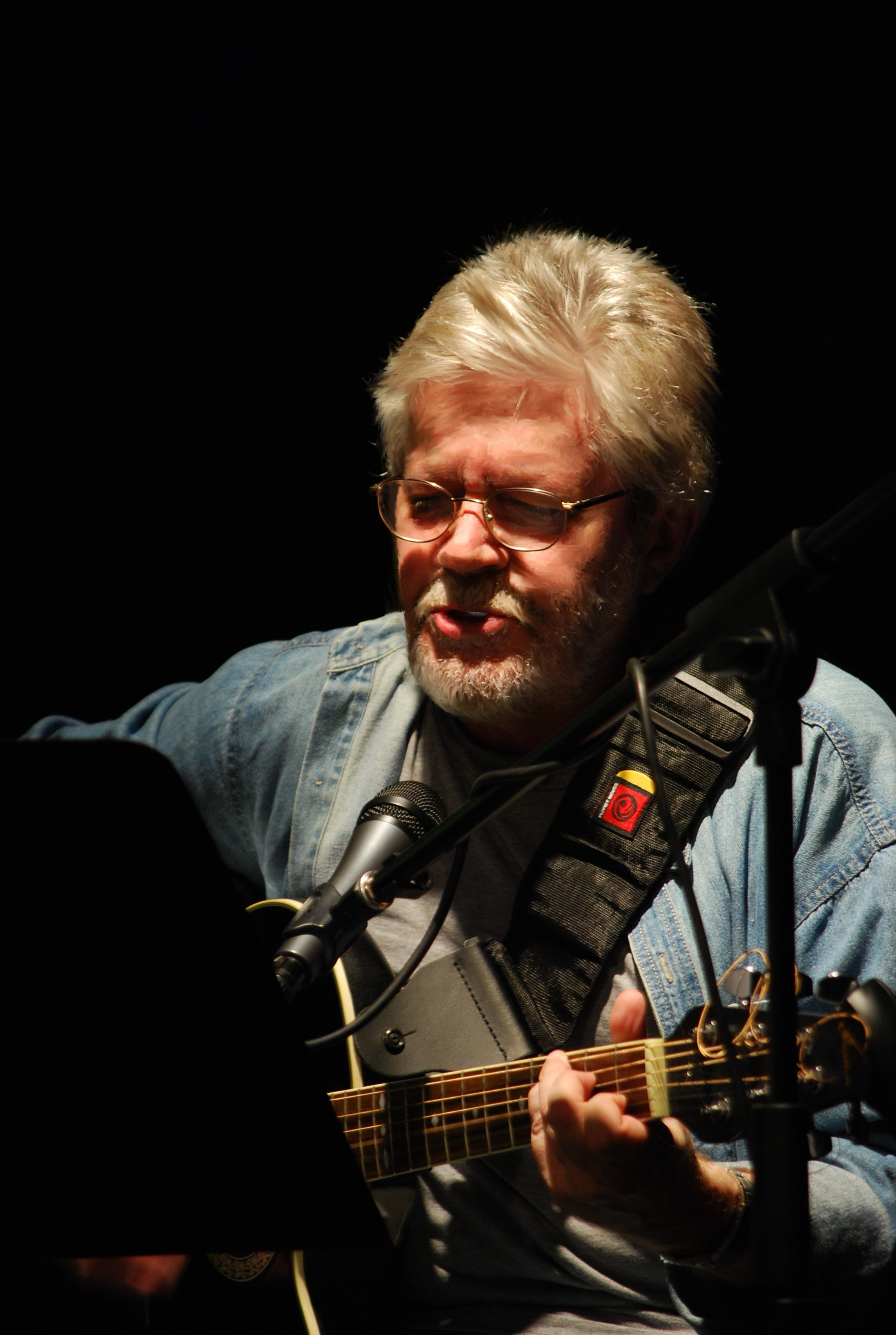 Xulio Formoso en el concierto "De par en par" en la Sala de Conciertos de UNEARTE de Caracas